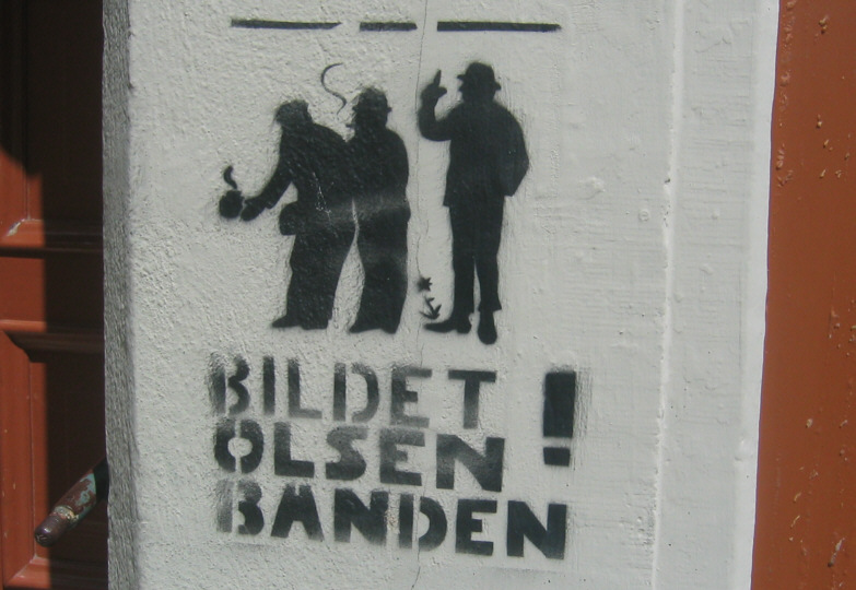 "Bildet Olsenbanden!", gesehen 2004 an einem Haus in Freiberg (Sachsen)